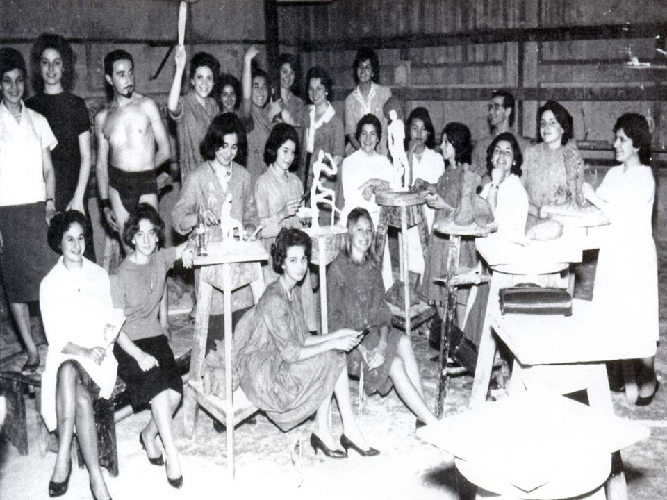 Alumnos de la Escuela de Bellas Artes Manuel Belgrano